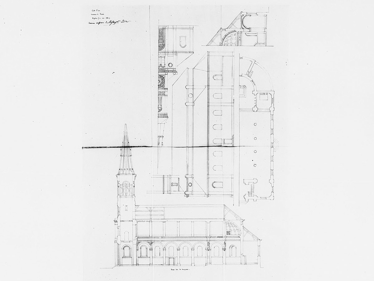 Plan de l'actuelle église de Genlis